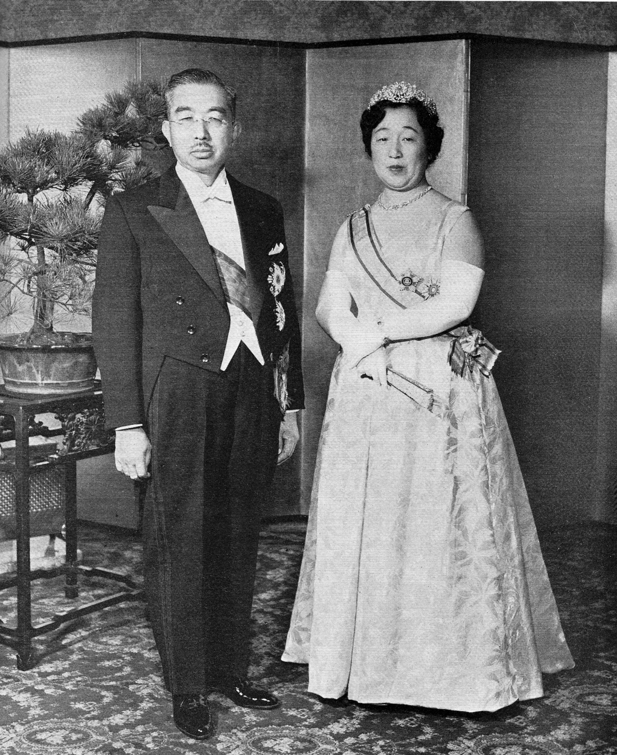 正装姿の昭和天皇（燕尾服・大勲位菊花大綬章・同副章）と香淳皇后（ローブデコルテ・勳一等宝冠章・同副章）